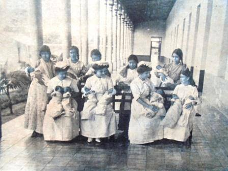 Niños atendidos en el asilo de maternidad Joaquina.